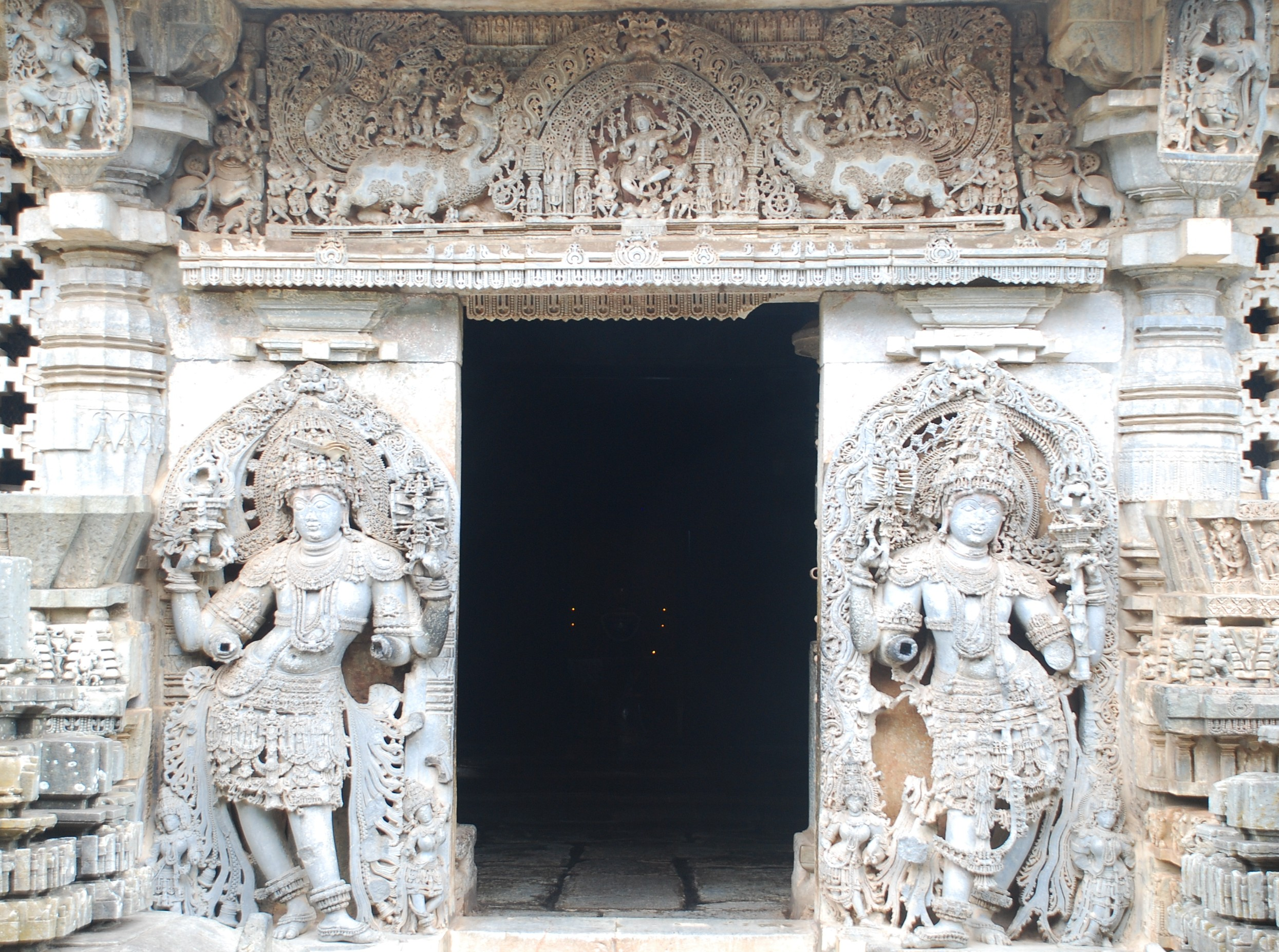 ಕನ್ನಡ: ಹೊಯ್ಸಳೇಶ್ವರ ದೇವಾಲಯದ ಹೆಬ್ಬಾಗಿಲು